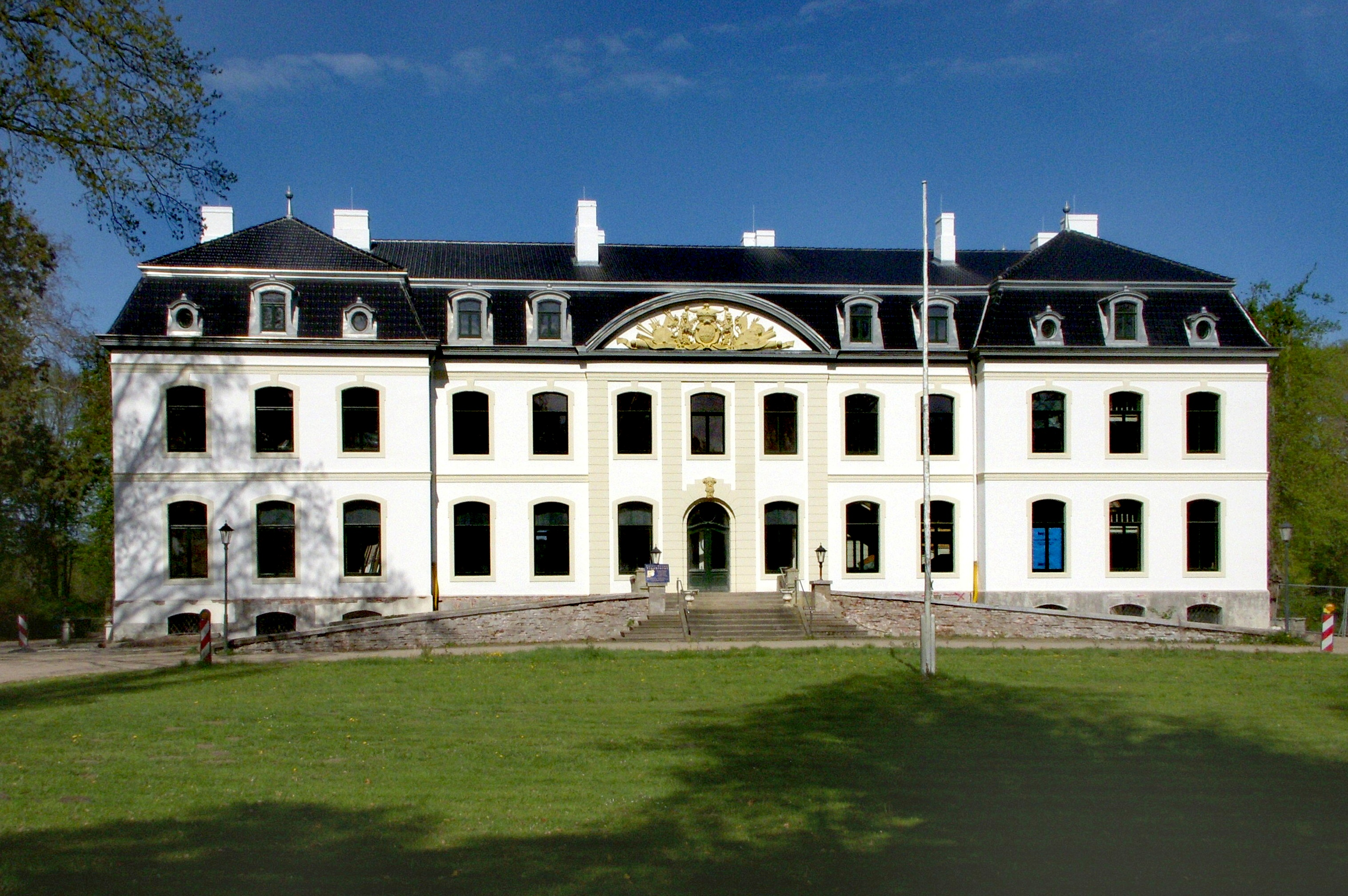 Gut Weissenhaus, Hoffassade